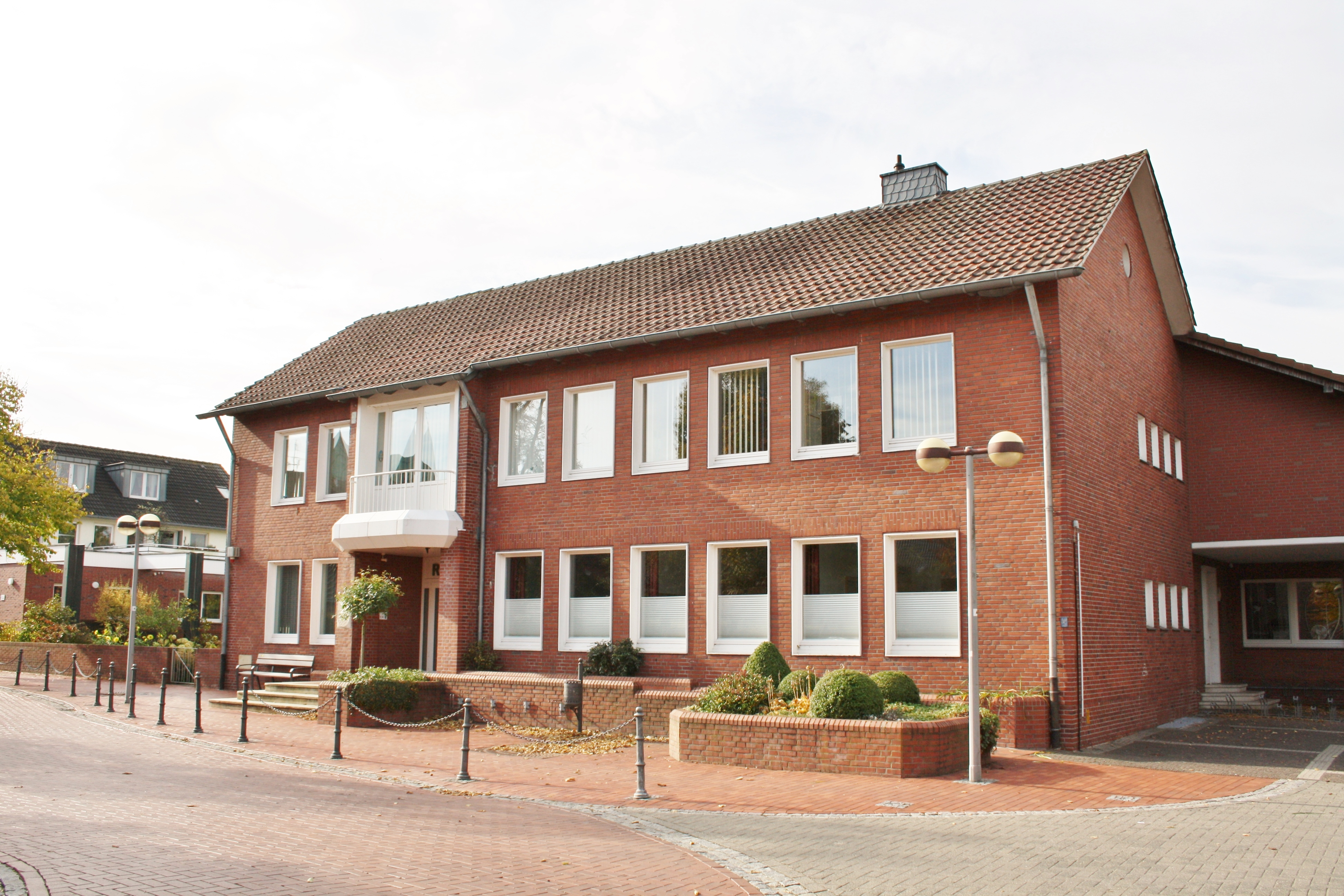 Perspektivischer Blick auf das Rathaus von Legden.